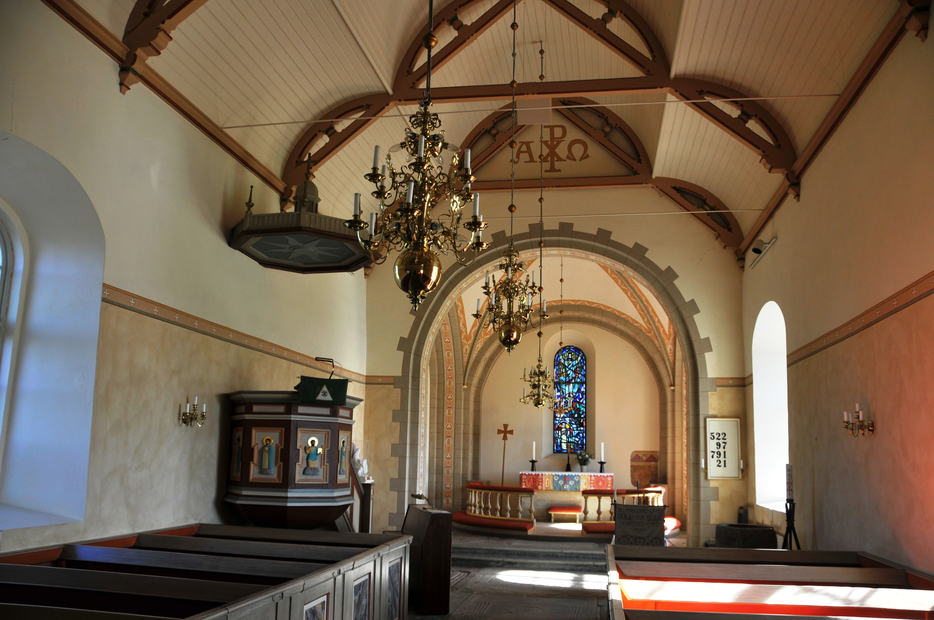 Kirch in Gudhem, Inneres